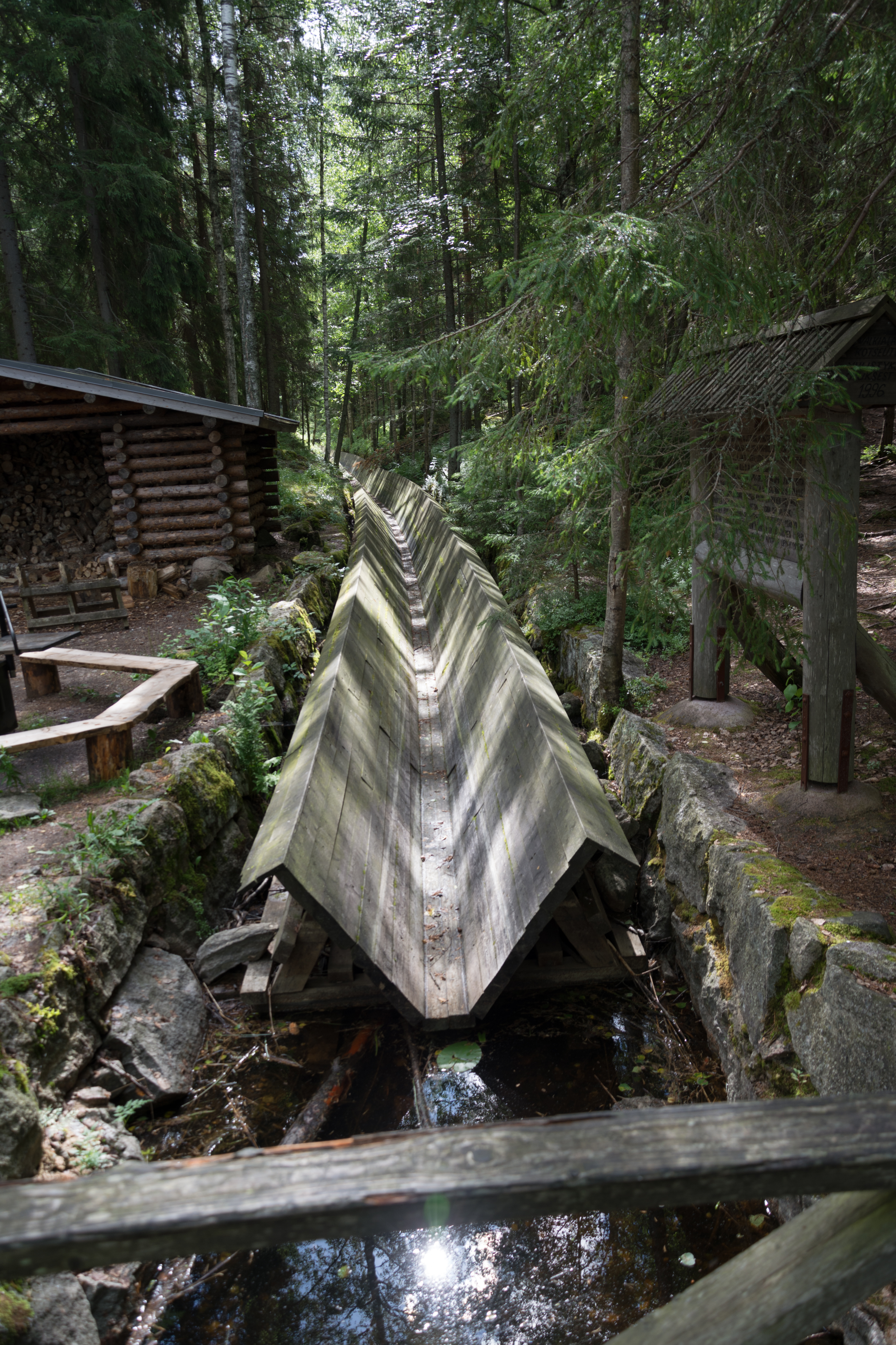 Kuutin kanava Repoveden kansallispuistossa